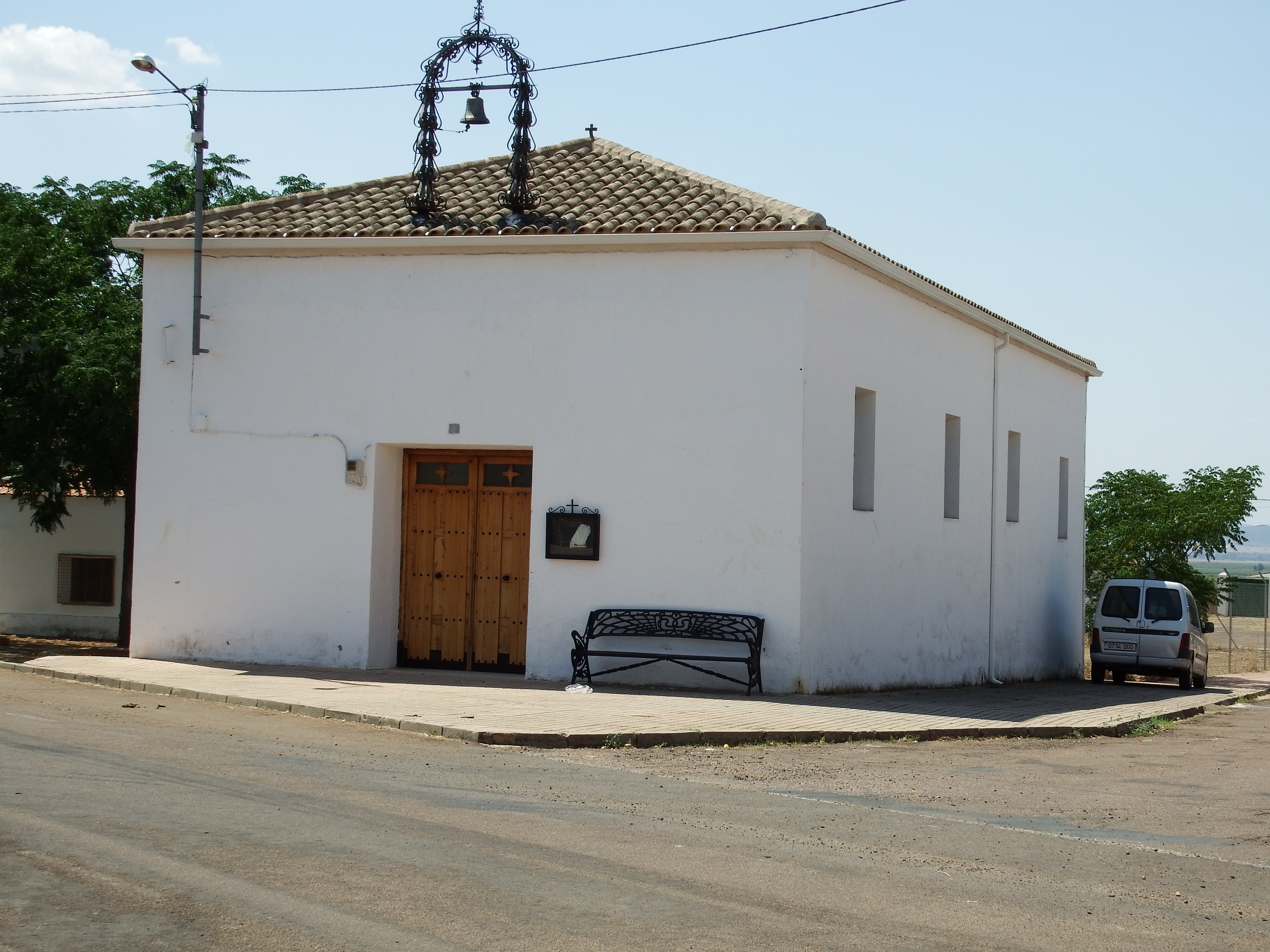 El Trincheto, Porzuna